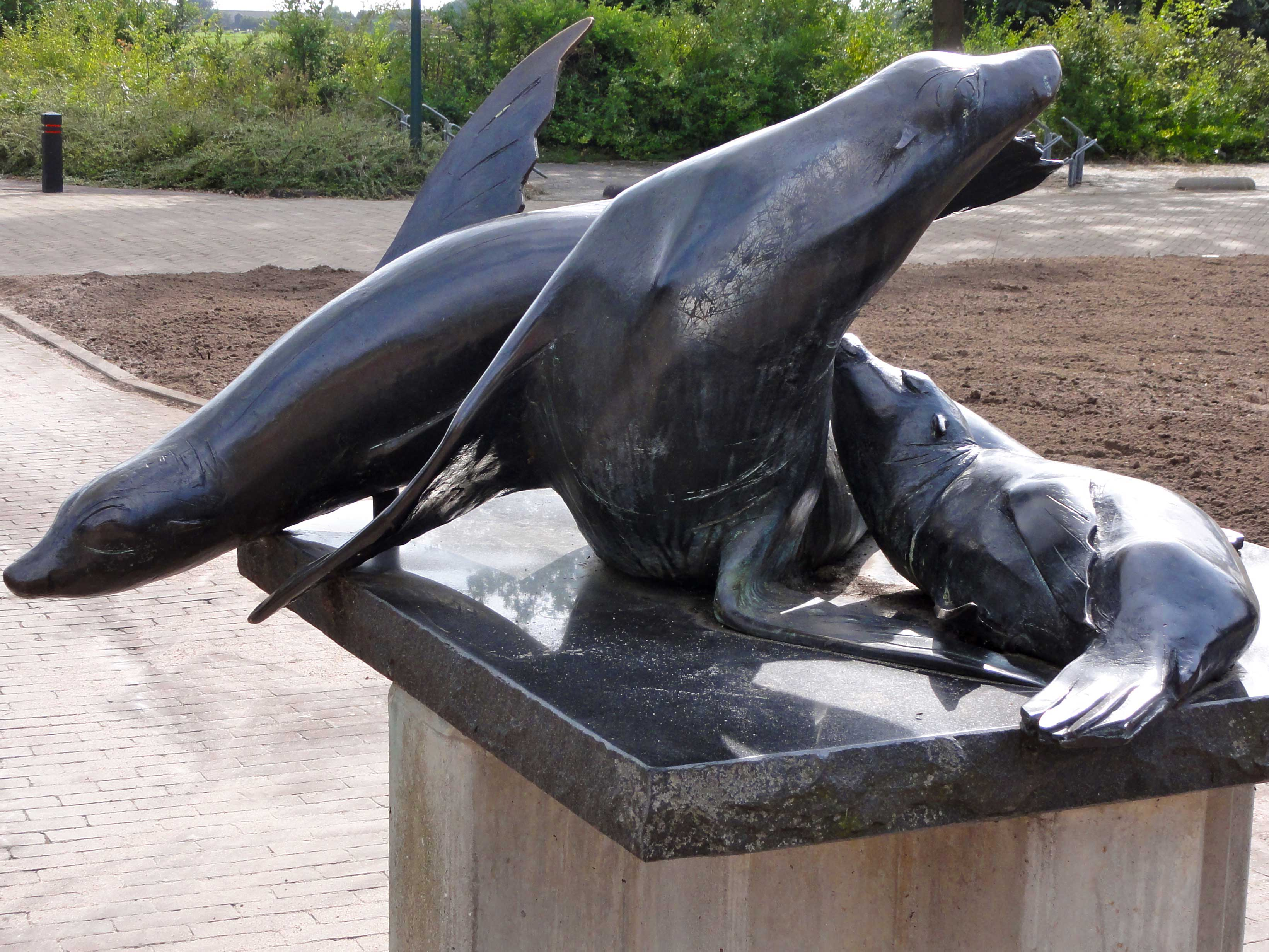 Zeeleeuwen door Hetty Heyster bij zwembad de Duker in Bunschoten-Spakenburg